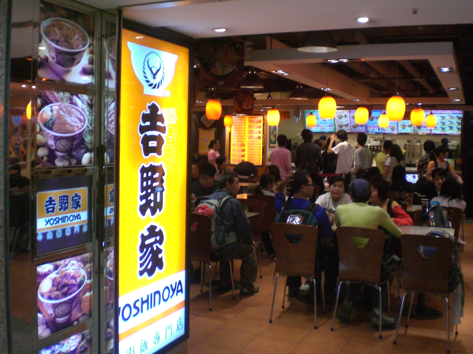 元朗區元朗新市鎮青山公路元朗段 元朗廣場 吉野家